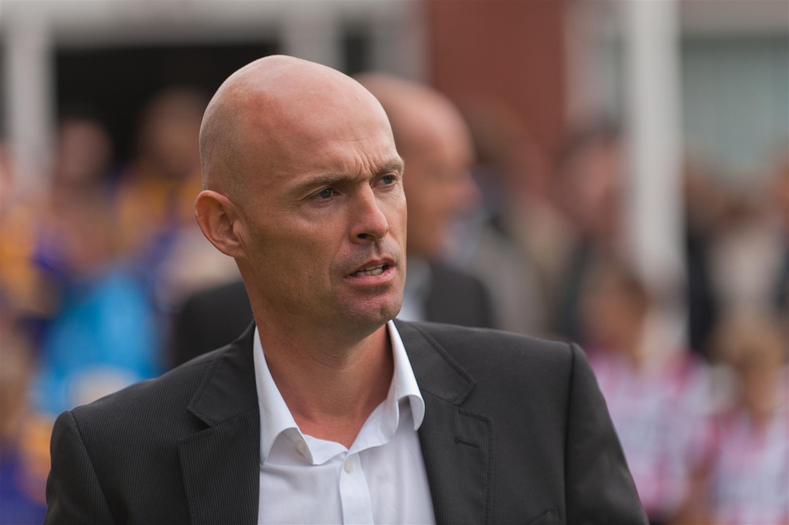 Marcel Keizer in september 2011 als trainer van VVSB.